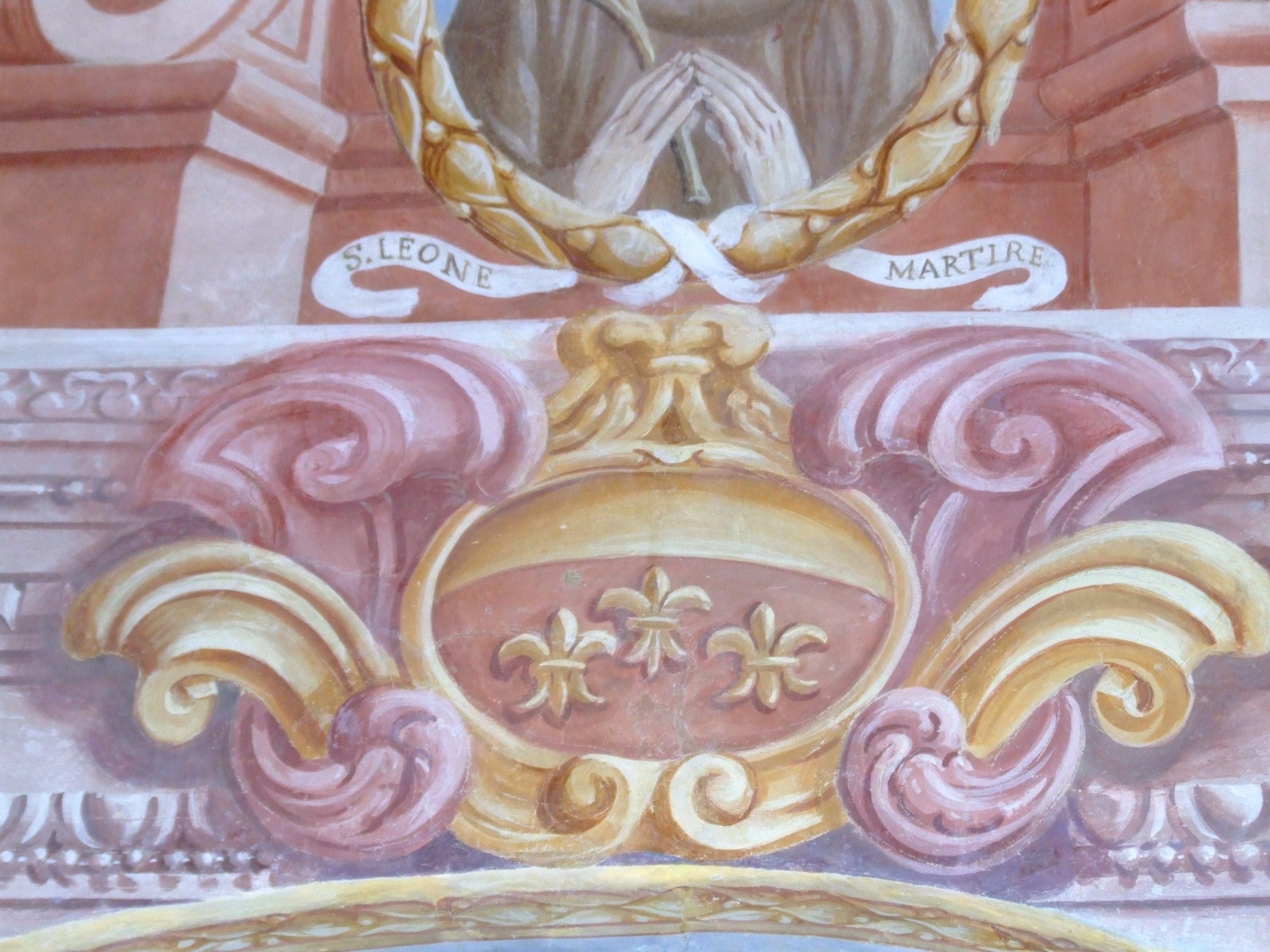 Stemma arcaico dei Conti di Marsciano